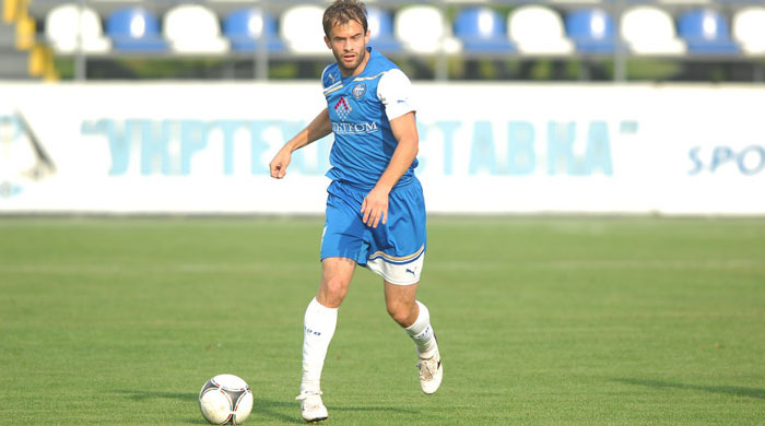 Maksym Drachenko